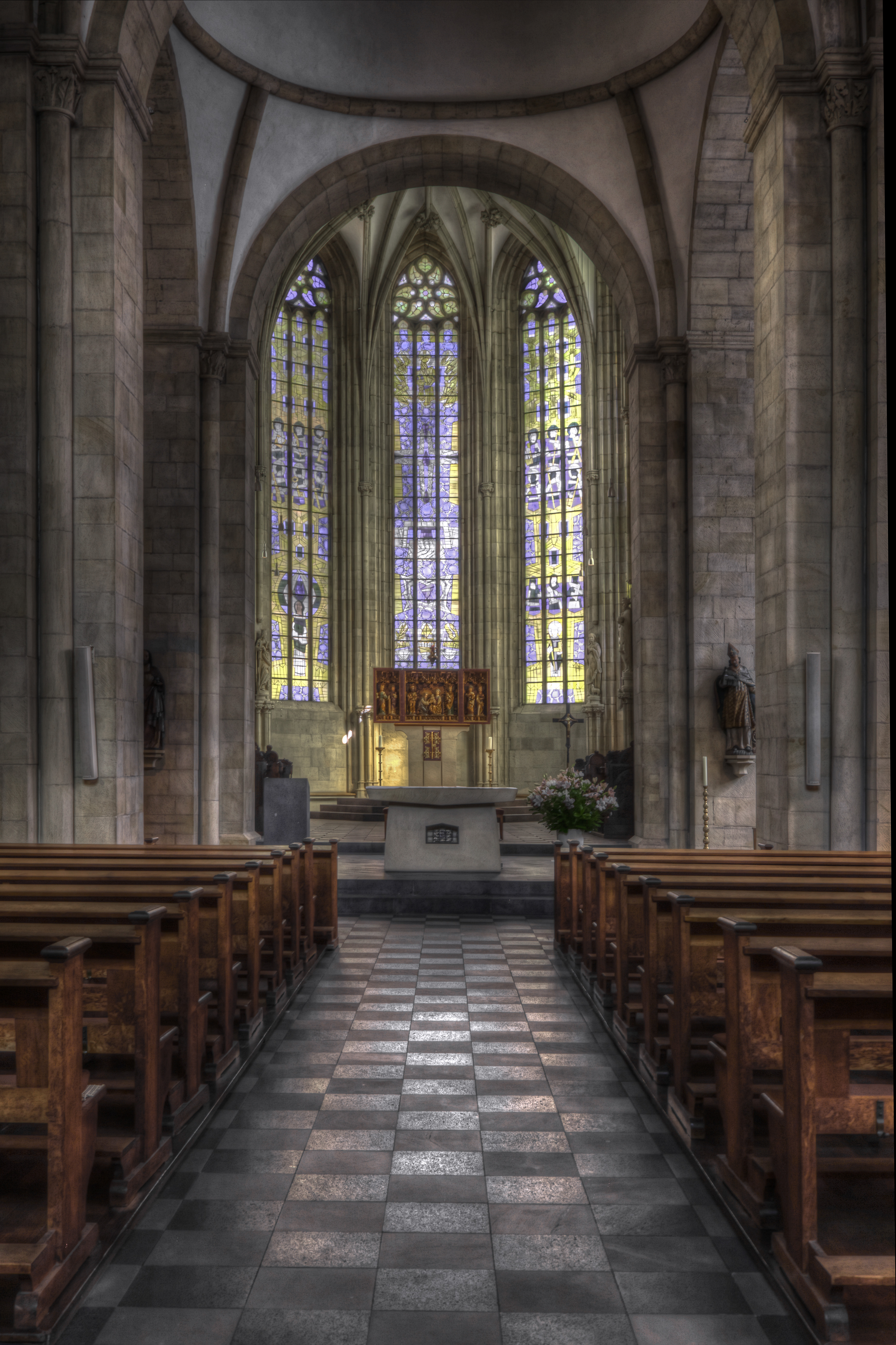 St. Ludgerus - Münster